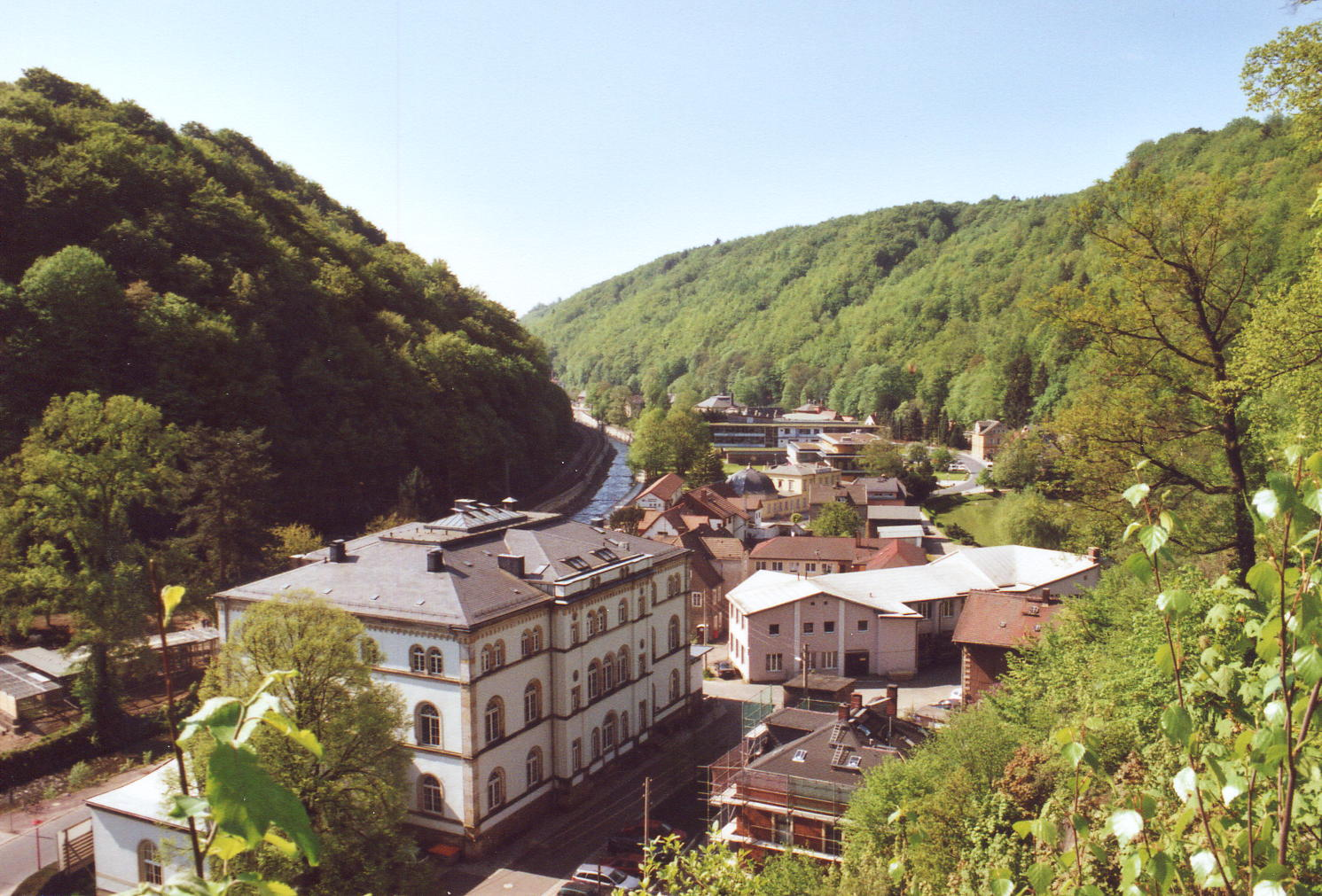 Tharandt: Blick vom Burgberg ins Tal der Wilden Weißeritz (Ri. Freiberg).